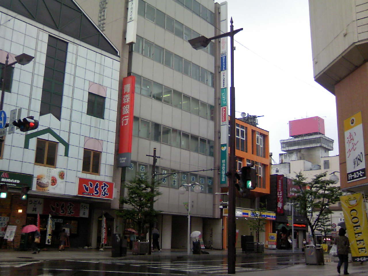 青銀・明治安田生命ビル（青森県八戸市） (Aogin-MeijiYasudaSeimei Building - Hachinohe, Aomori, JAPAN)